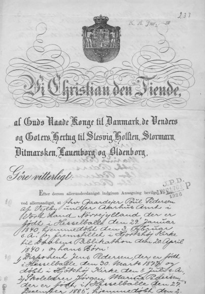 Bevilling om navneforandring fra 1917, hvorved Gaardejer Poul Pedersen af Vejlby og dennes efterkommere bevilges ret til at føre familienavnet Helbo.